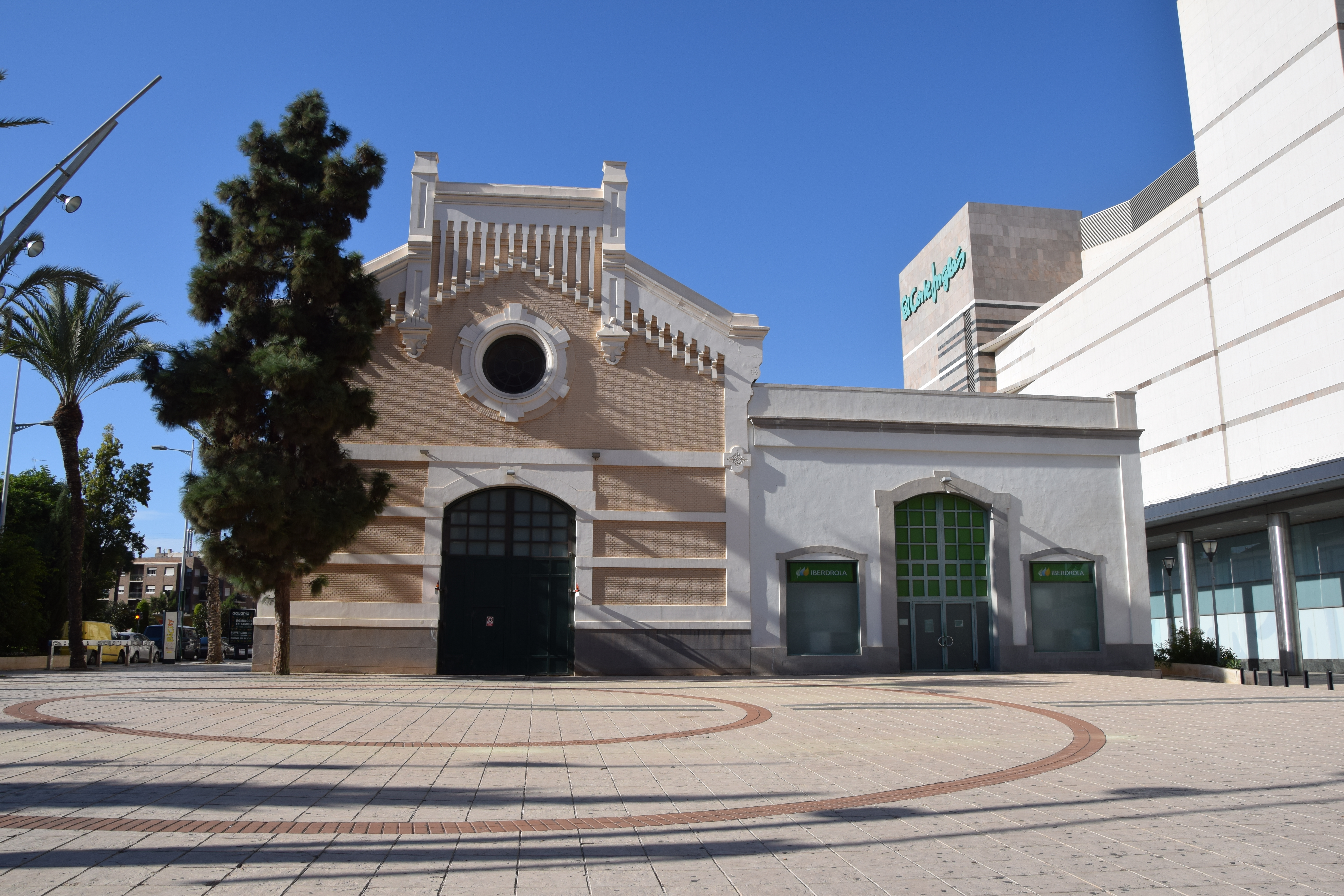 Fábrica de Fluido Eléctrico Hispania. Llamada desde siempre por los Cartageneros la fabrica de la luz situada en el ensanche de Cartagena con el tiempo paso a ser una estacion de transformacion electrica y ultimamente se construyo en parte del solar el Corte Ingles de Cartagena.